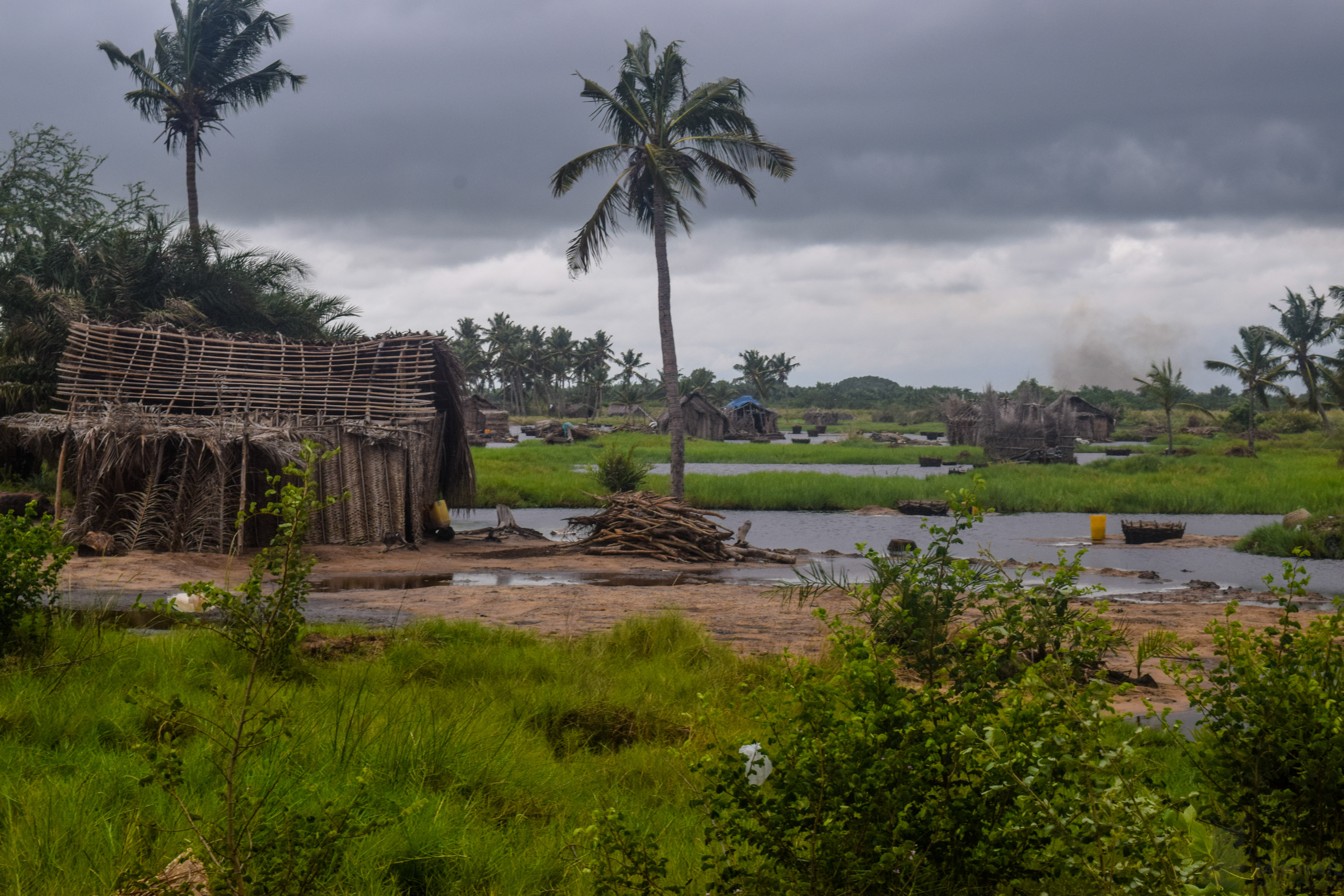 Zone de production de sel à Ouidah